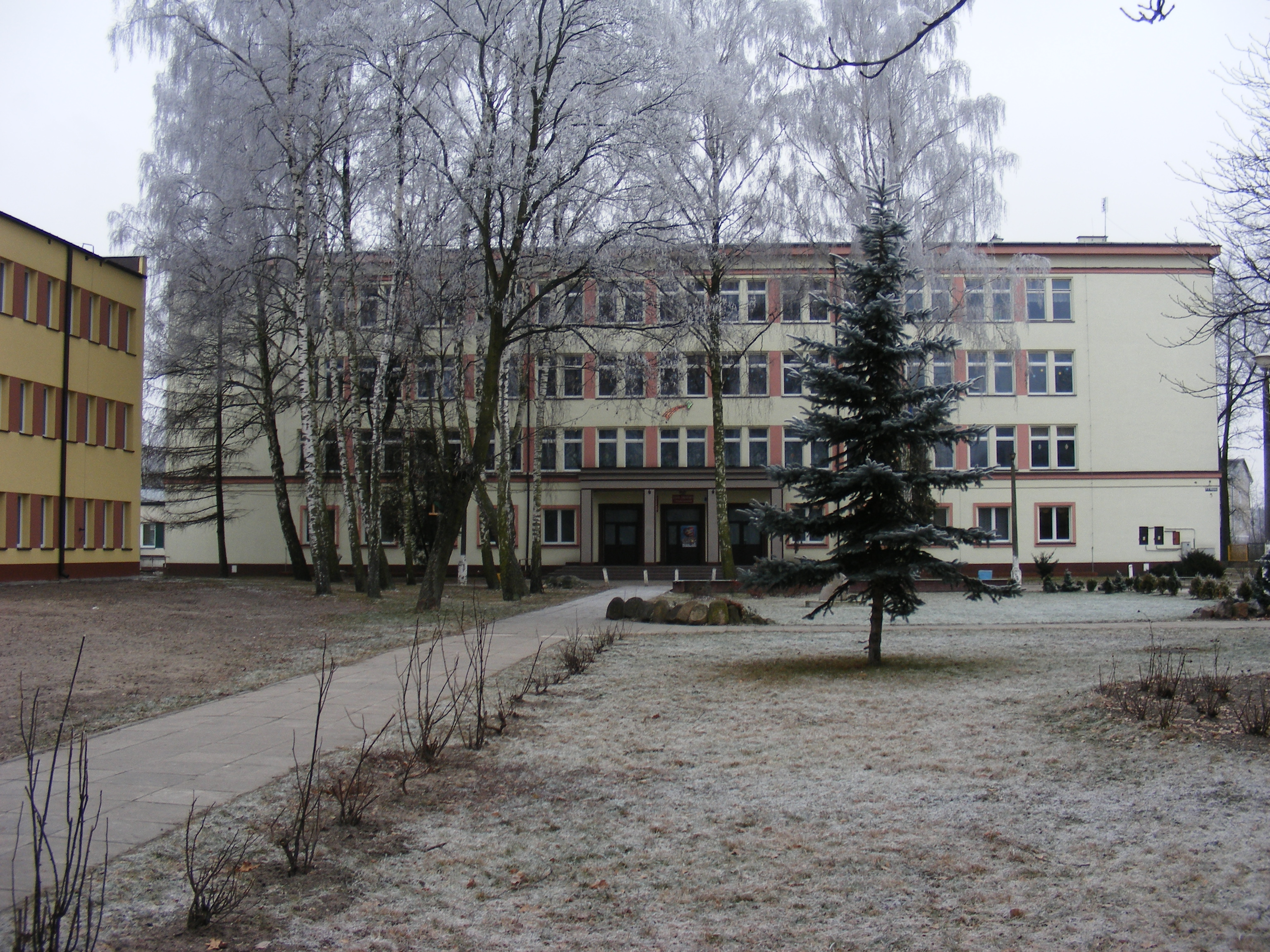 Budynek szkoły podstawowej i gimnazjum.